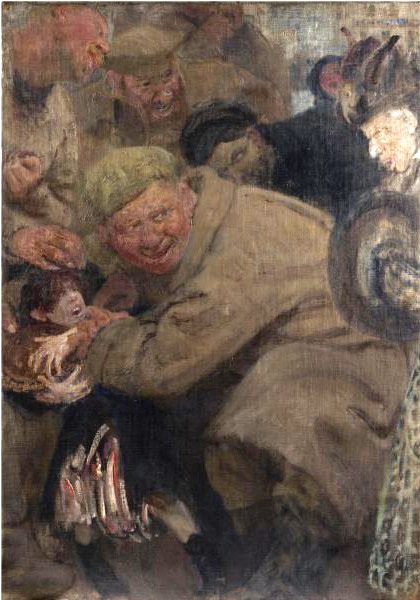 Красноармеец, отнимающий хлеб у ребёнка (Большевики)